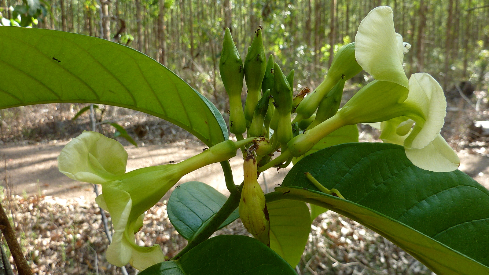 Odontadenia lutea (Vell.) Markgr.